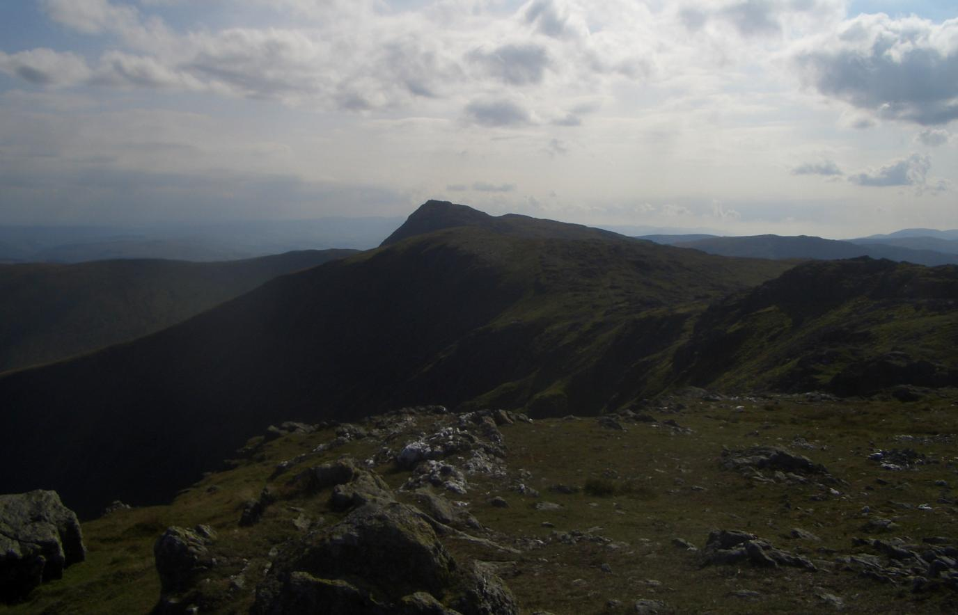 erw y ddafad ddu